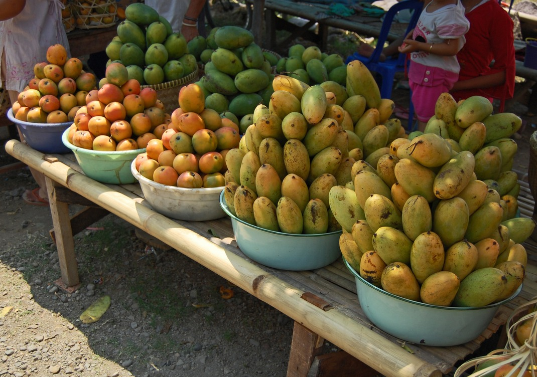 Many cultivars of mango, Mangifera indica from West Java, Indonesia. E.g. mangga golek, mangga gedong and mangga arumanis.